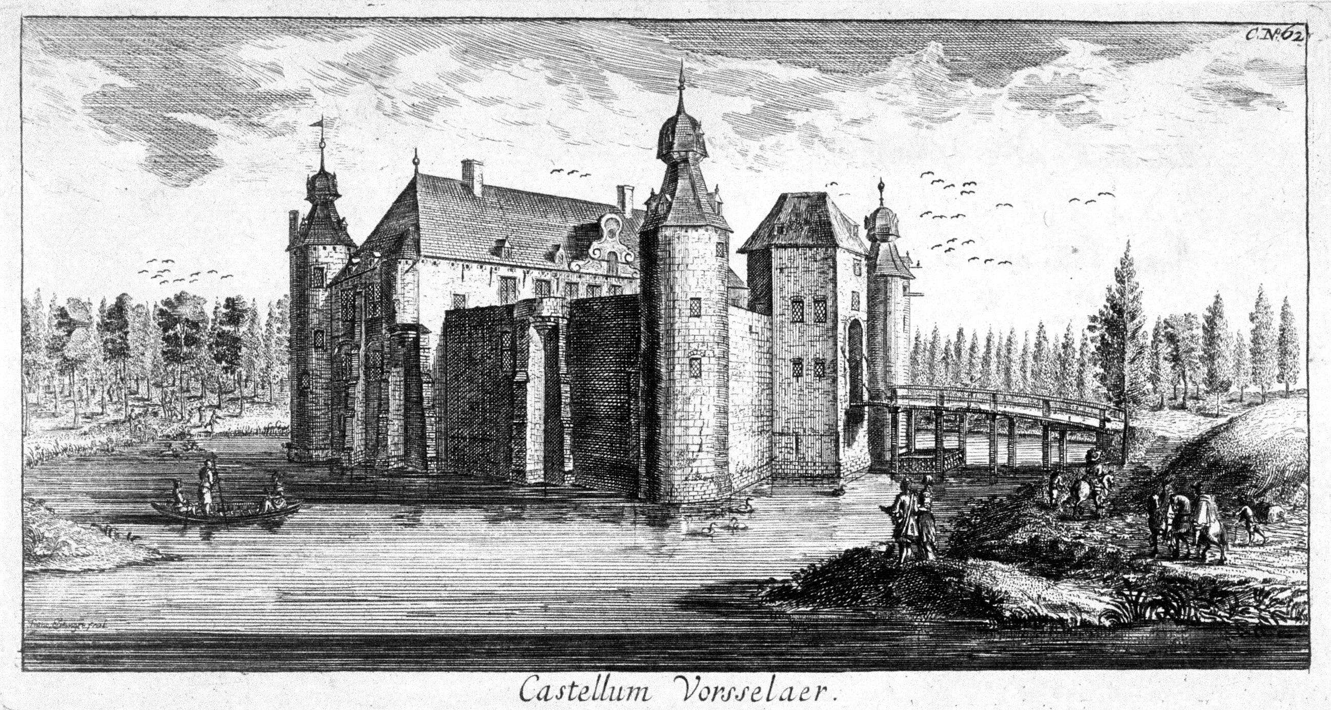 Stich mit der Abbildung des Schlosses Vorselaar